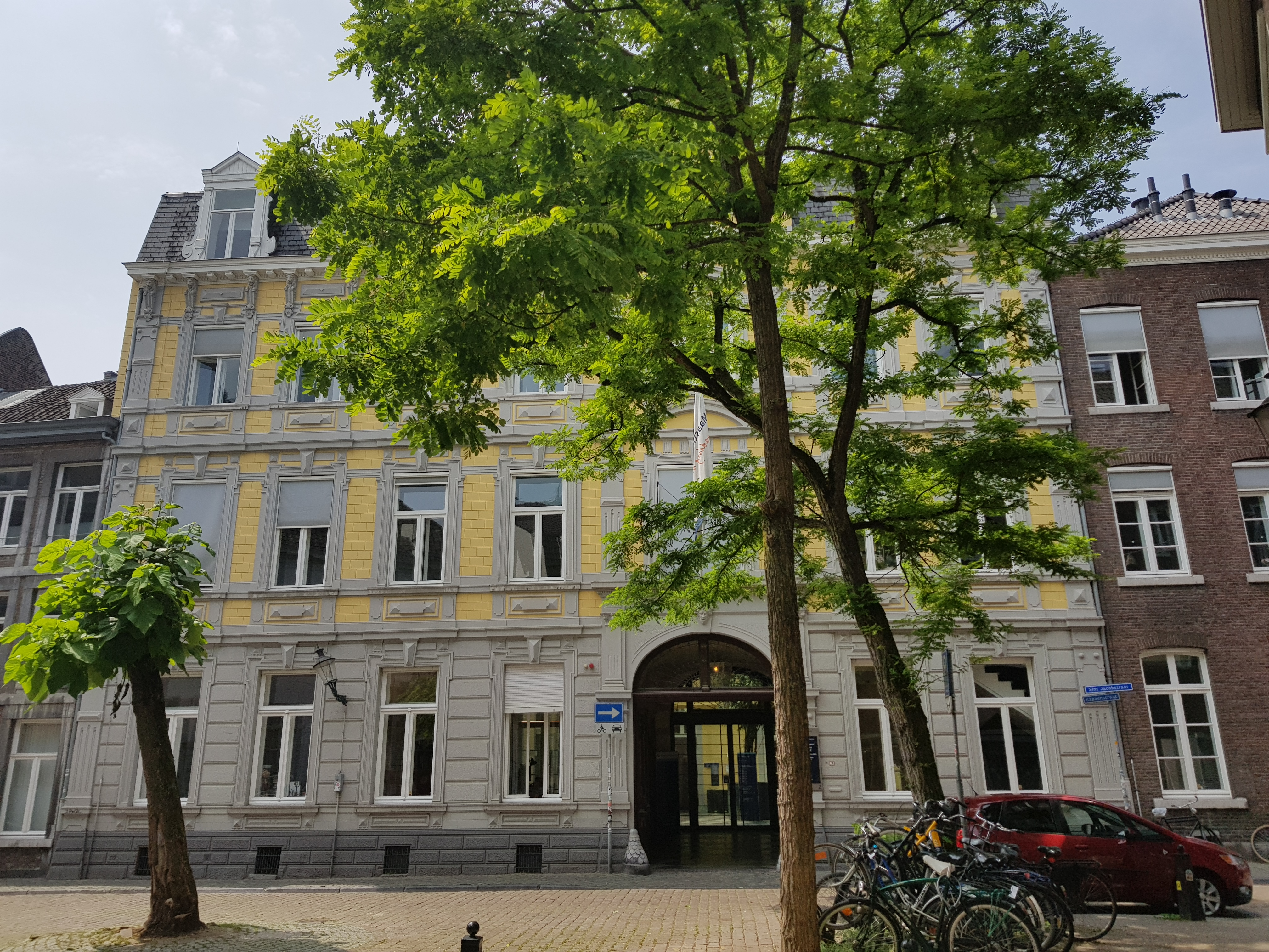 Herenhuis Hustinx, Maastricht, Nederland